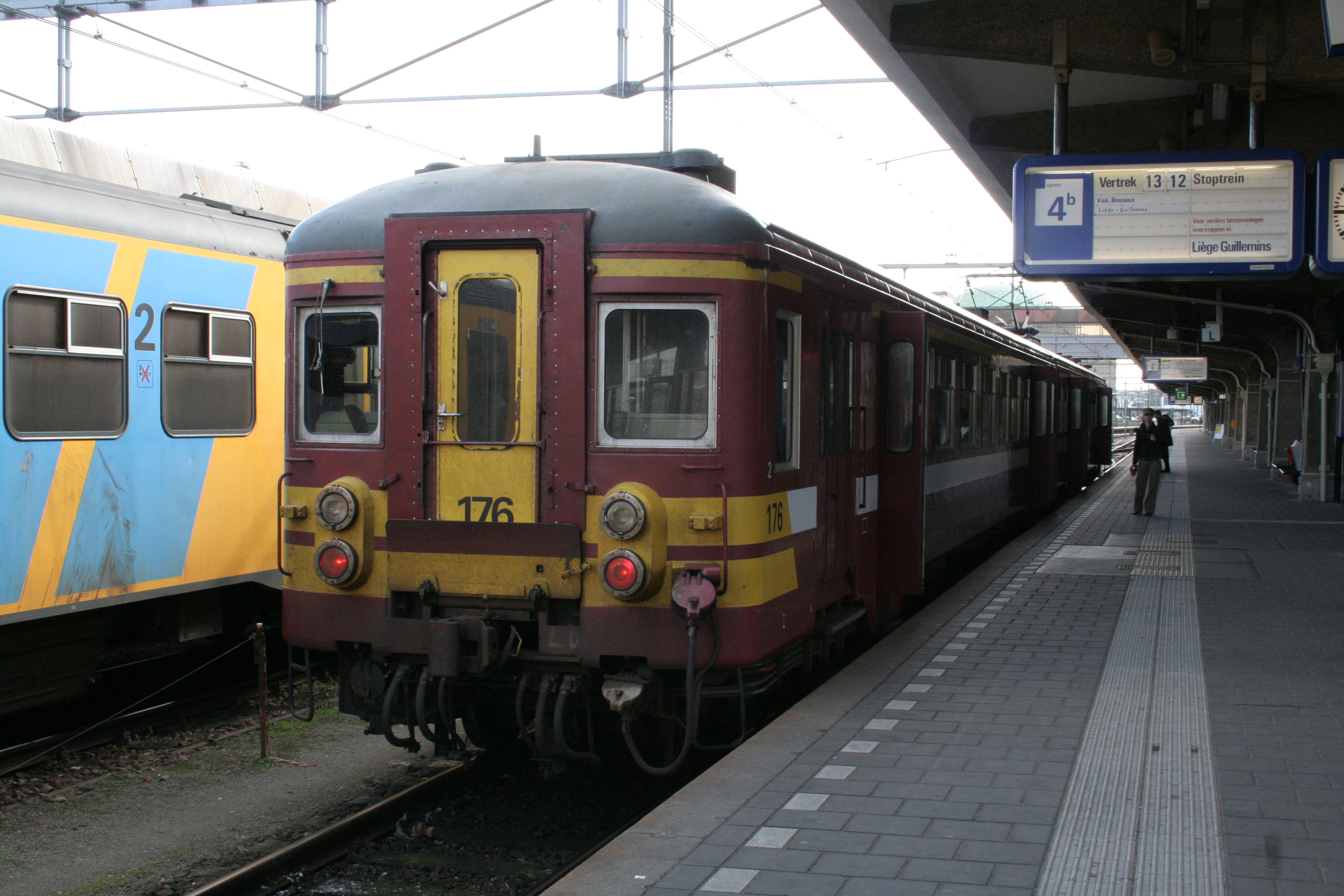 Klassiek motorstel te Maastricht. (EMU means electric multiple unit.)